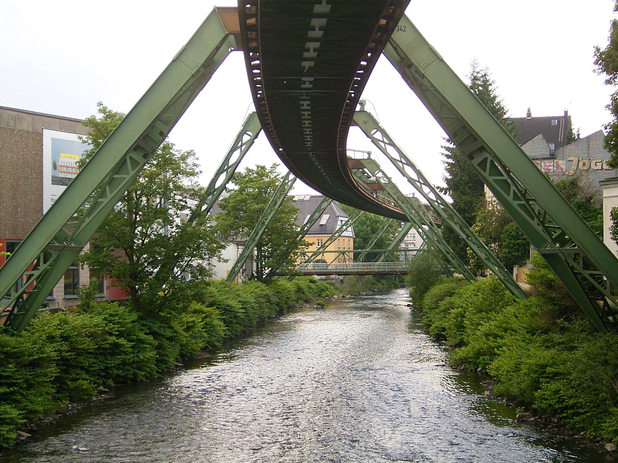 Mühlenbrücke über die Wupper in Wuppertal